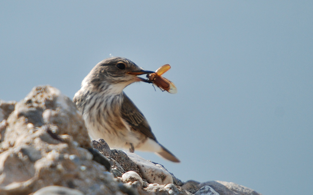 Kurdî: Li Qoruxçî hatiye kişandin...Navê Kurdî nehatiye tespît kirin...